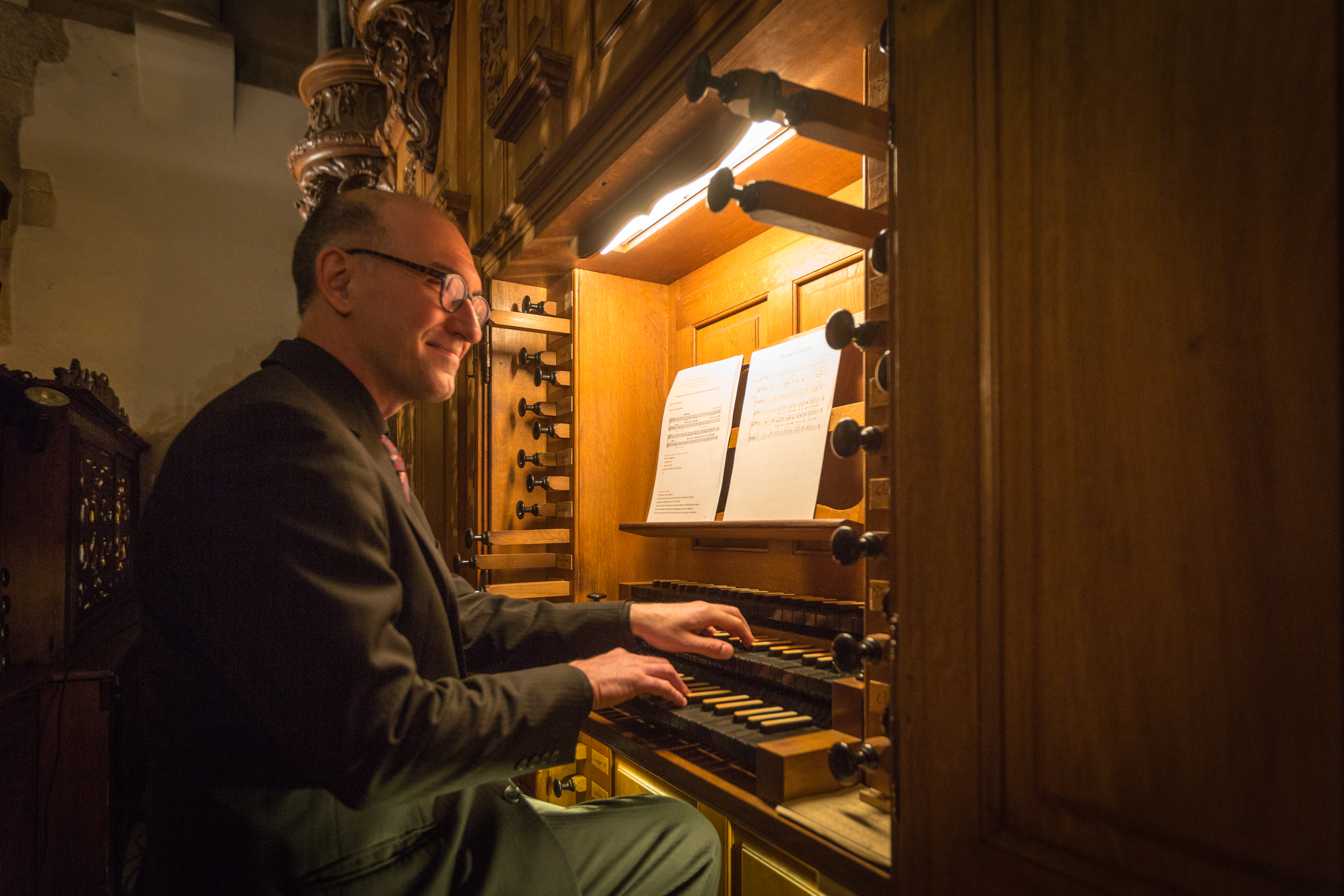 L’organiste Daniel Leininger au clavier de l’orgue Silbermann pendant le culte d’installation de M. Christian Albecker comme président de l’Église protestante de la Confession d’Augsbourg d’Alsace et de Lorraine en l’église Saint-Thomas de Strasbourg le 9 février 2014.